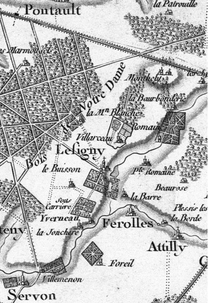 Détail de la Carte de Cassini N°1 (Paris et environs) datant de 1750 centré sur Lésigny (Seine-et-Marne). Catégorie:Cartes Histoire de France